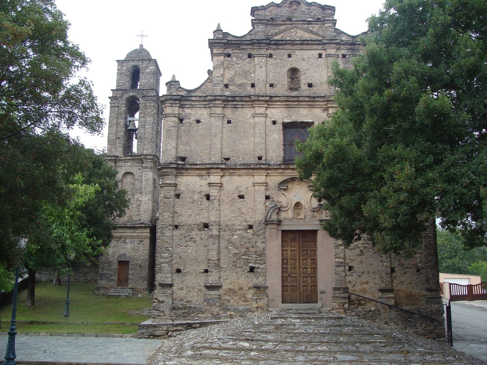 L'église de Tallone (Haute-Corse)